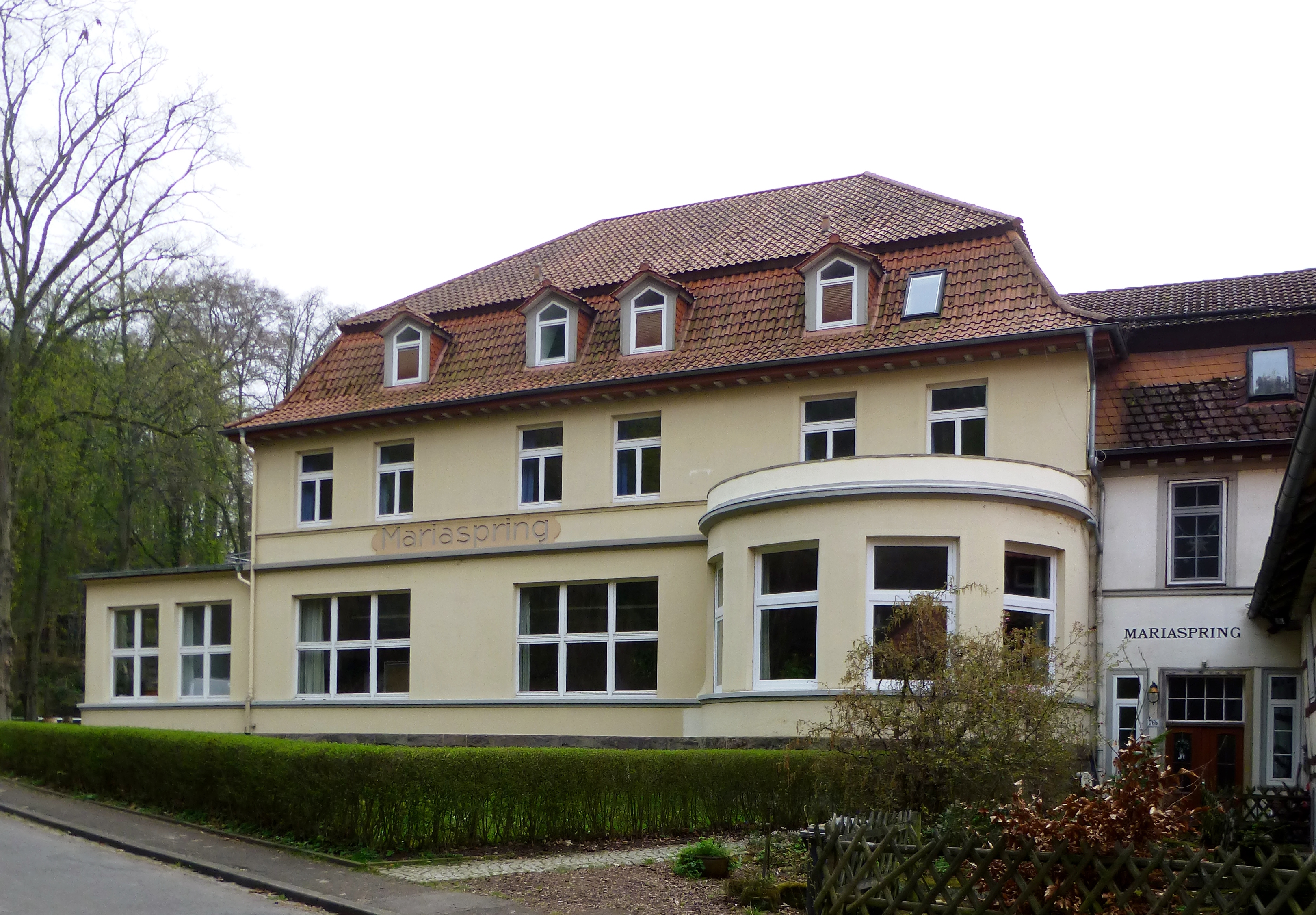 Ländliche Heimvolkshochschule Mariaspring in Rauschenwasser bei Eddigehausen, Flecken Bovenden, Südniedersachsen. Seit 1942 BDM-Heim, seit 1952 Haimvolkshochschule